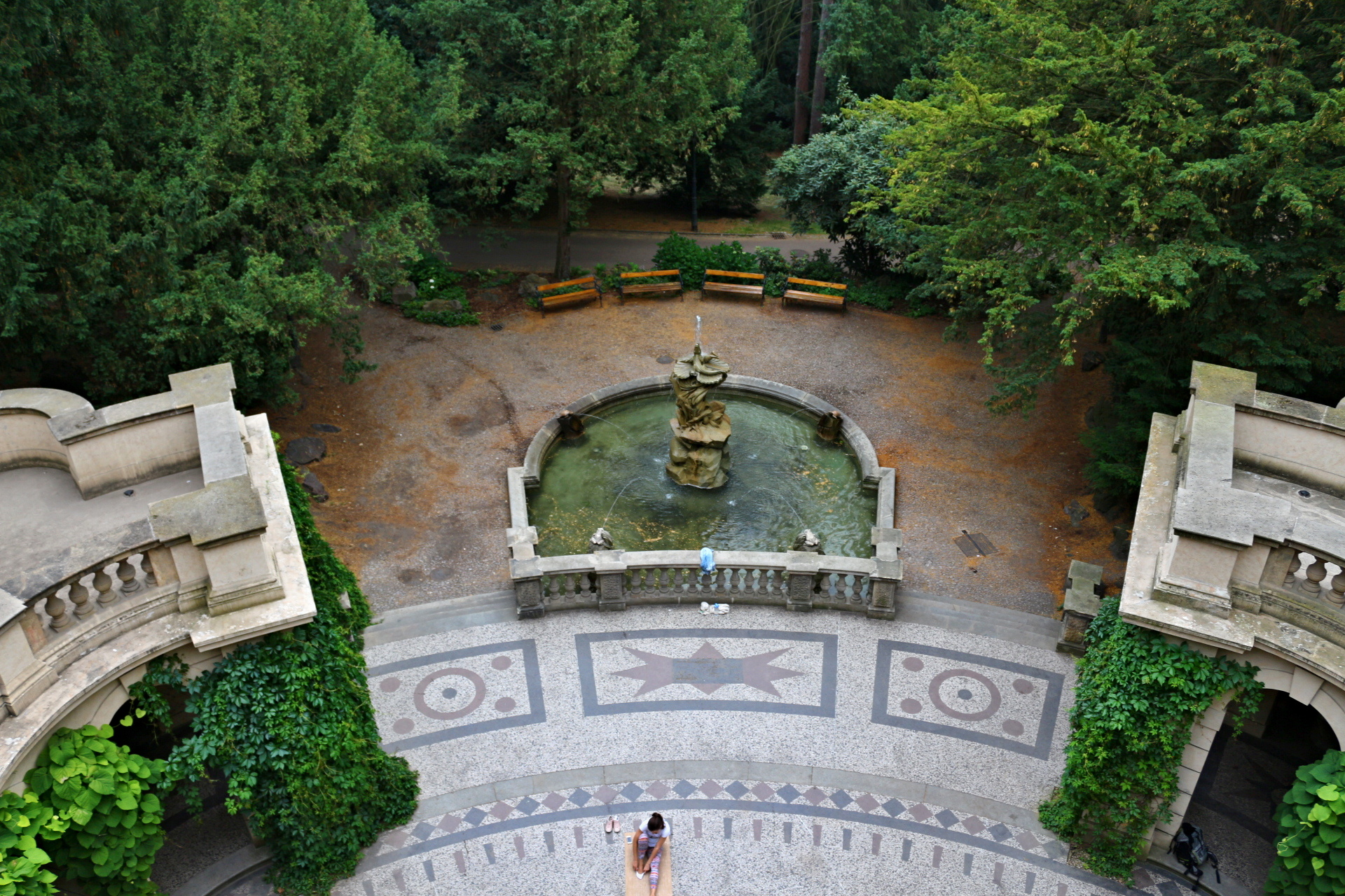 Fontána v grottě Havlíčkových sadů v Praze